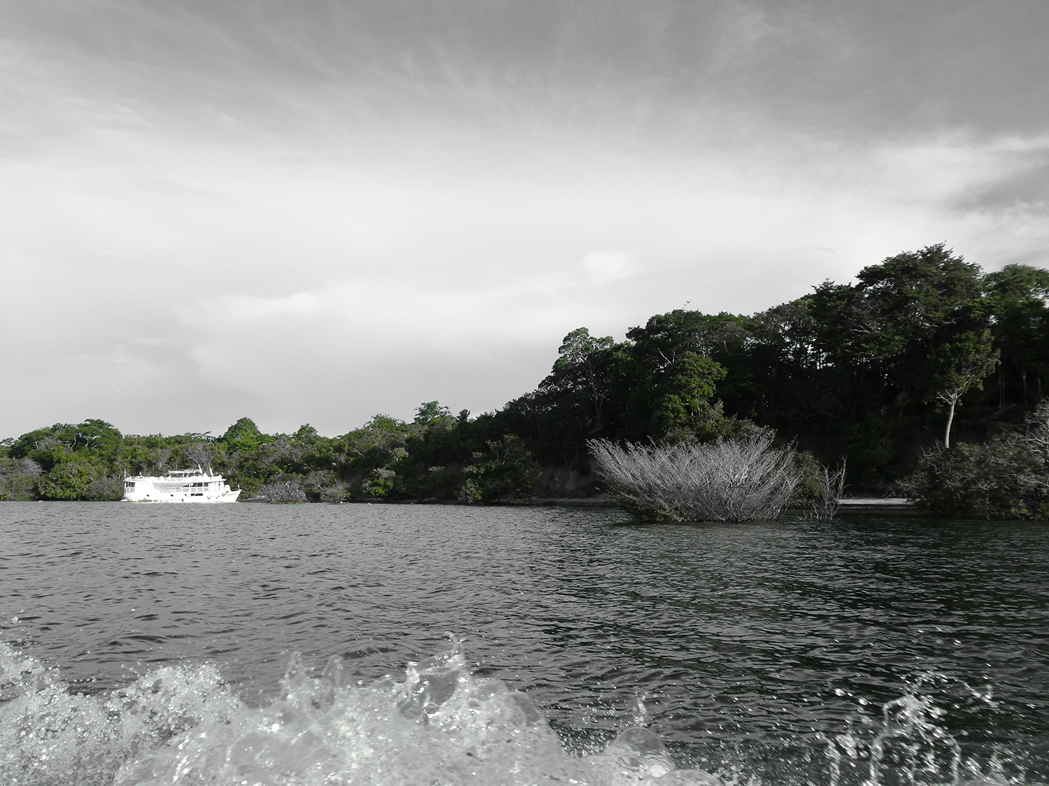 Paisagem em uma das praias na Reserva Extrativista Tapajós-Arapiuns, em Santarém, Pará (Brasil)